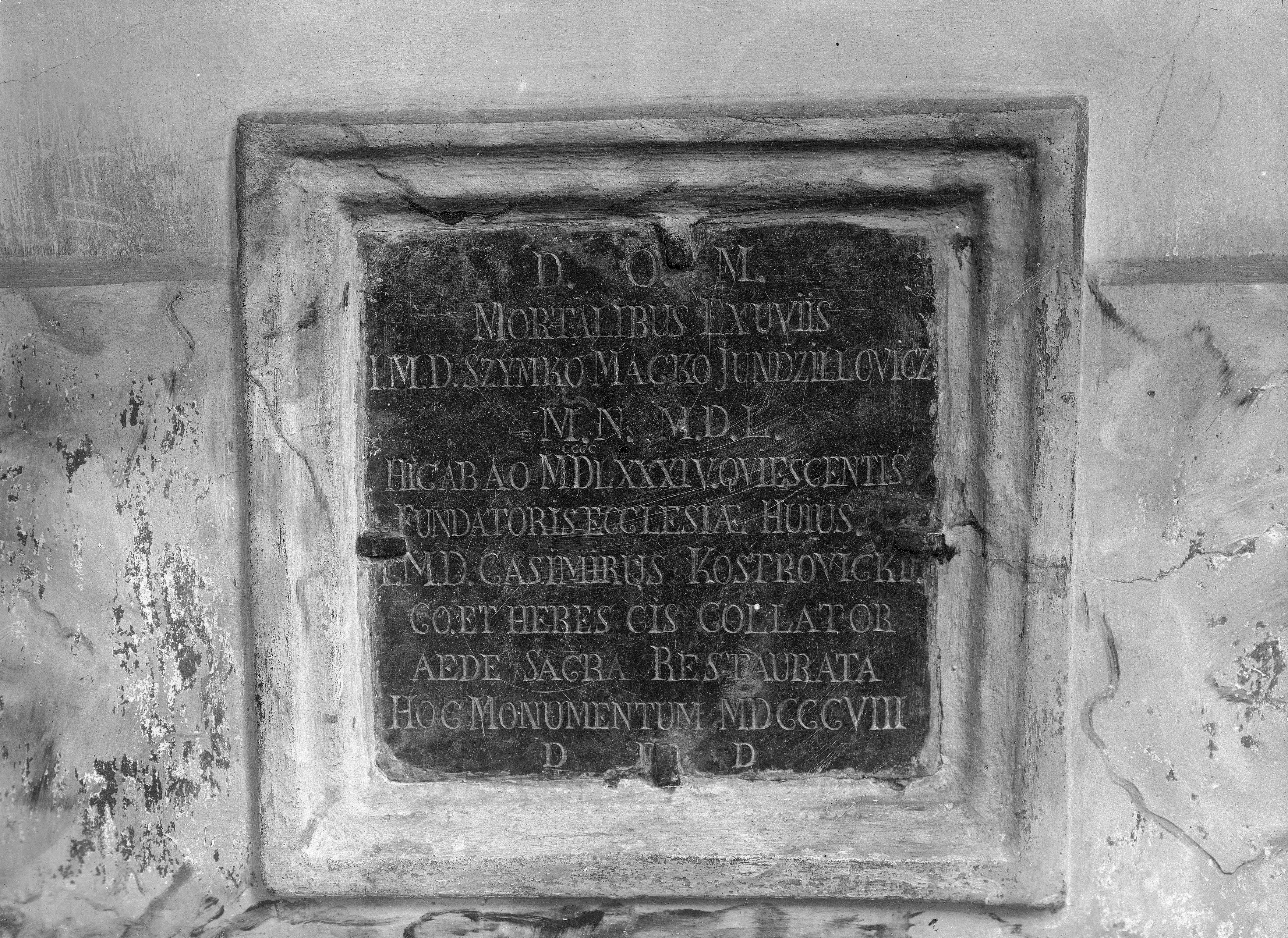 Беларуская (тарашкевіца): Мураванка (Muravanka). Царква Раства Багародзіцы, фундацыйная табліца